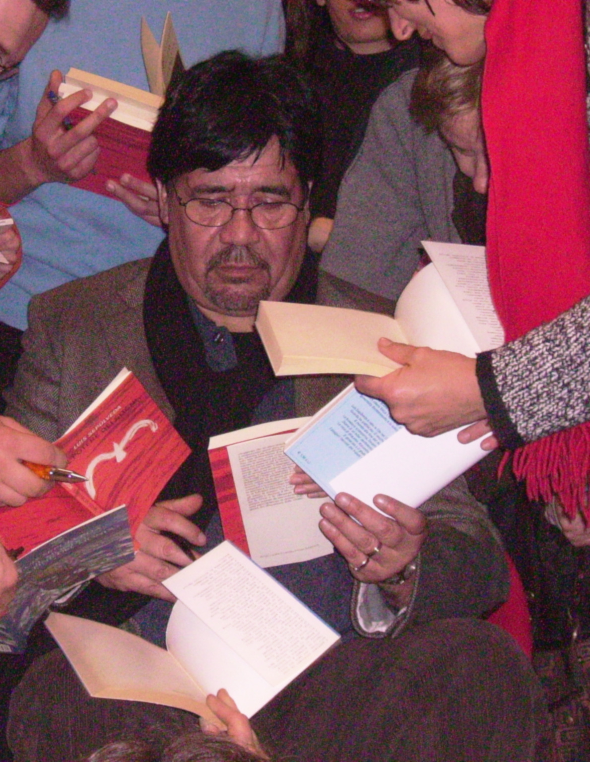 Luis Sepulveda ad Arona, incontro sul tema il sogno, circondato da appassionati, firma dediche del suo nuovo libro.